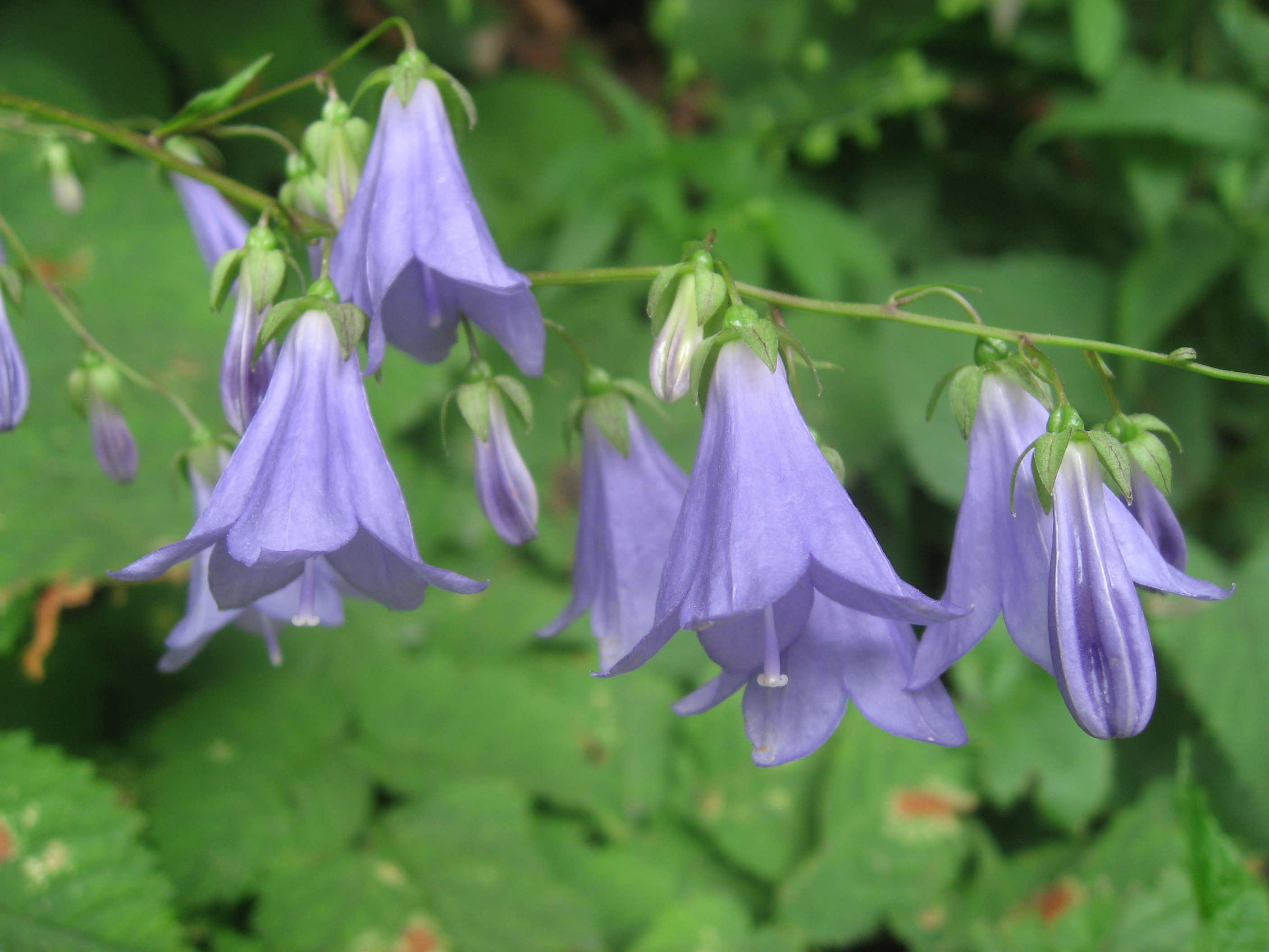 ソバナ_Adenophora_remotiflora.JPG 福島県会津地方